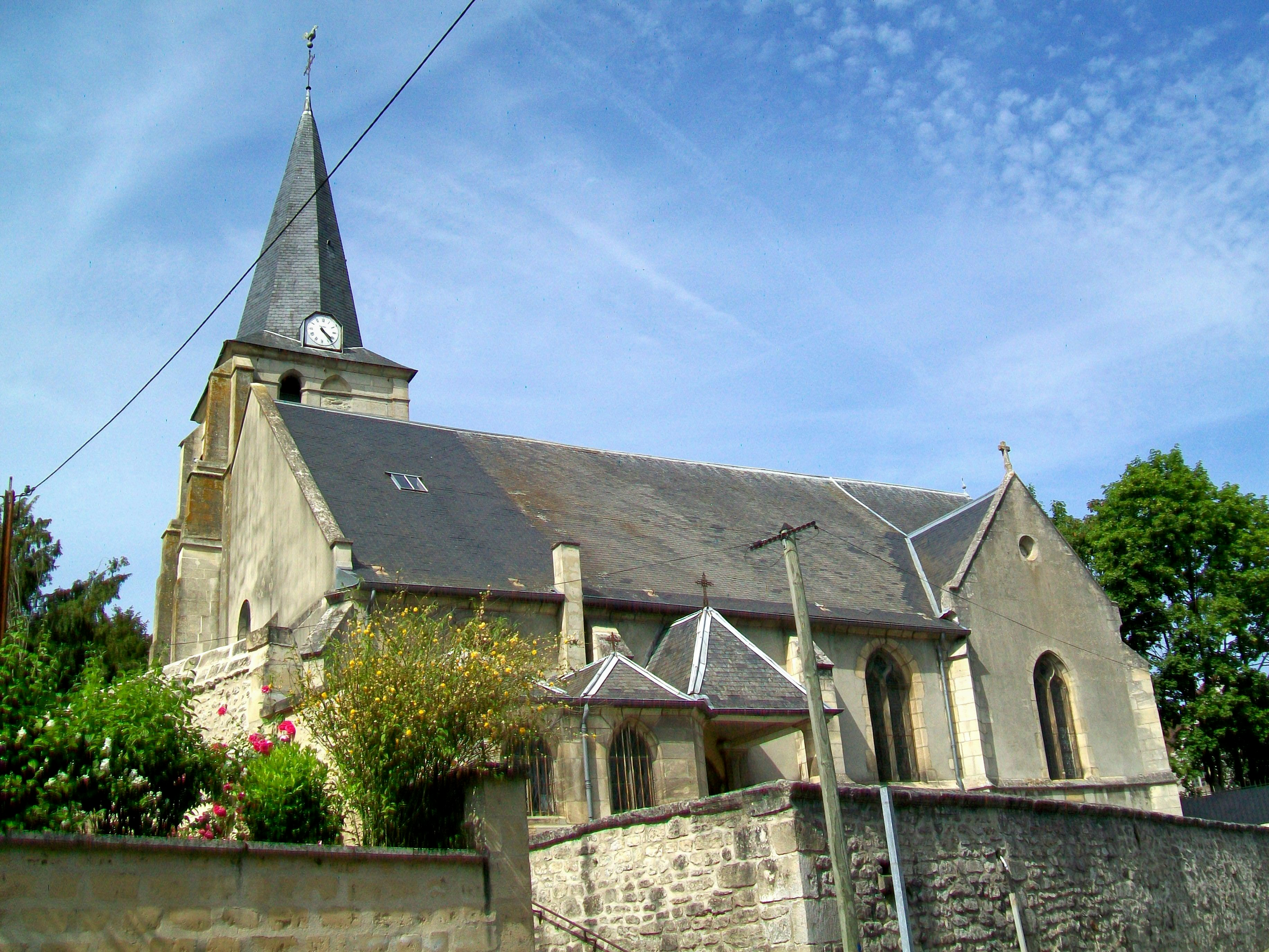 L'église Saint-Firmin, connue pour ses précieux vitraux.